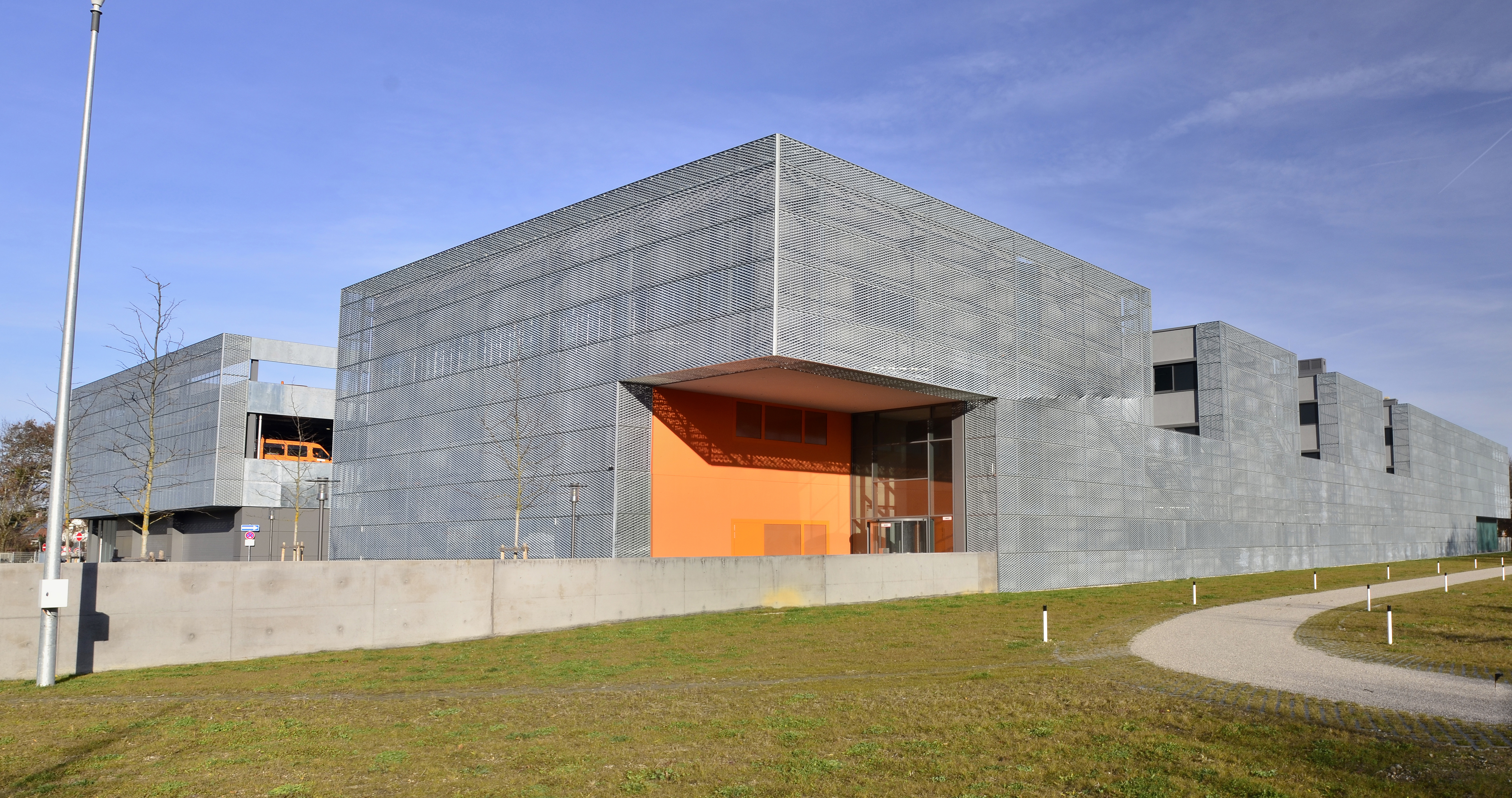 Germany, Munich, Schrangenhofstraße